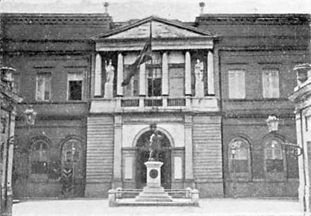 Entwurf von Auguste Henri Victor Grandjean de Montigny, Foto von 1906